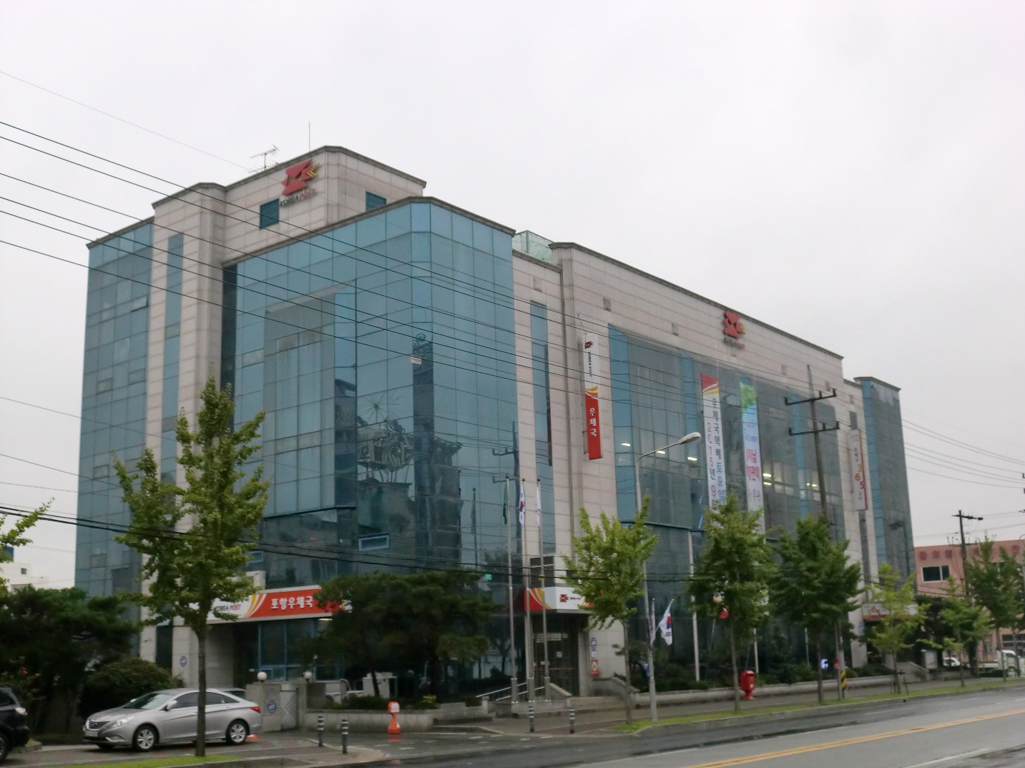 경상북도 포항시에 있는 포항우체국